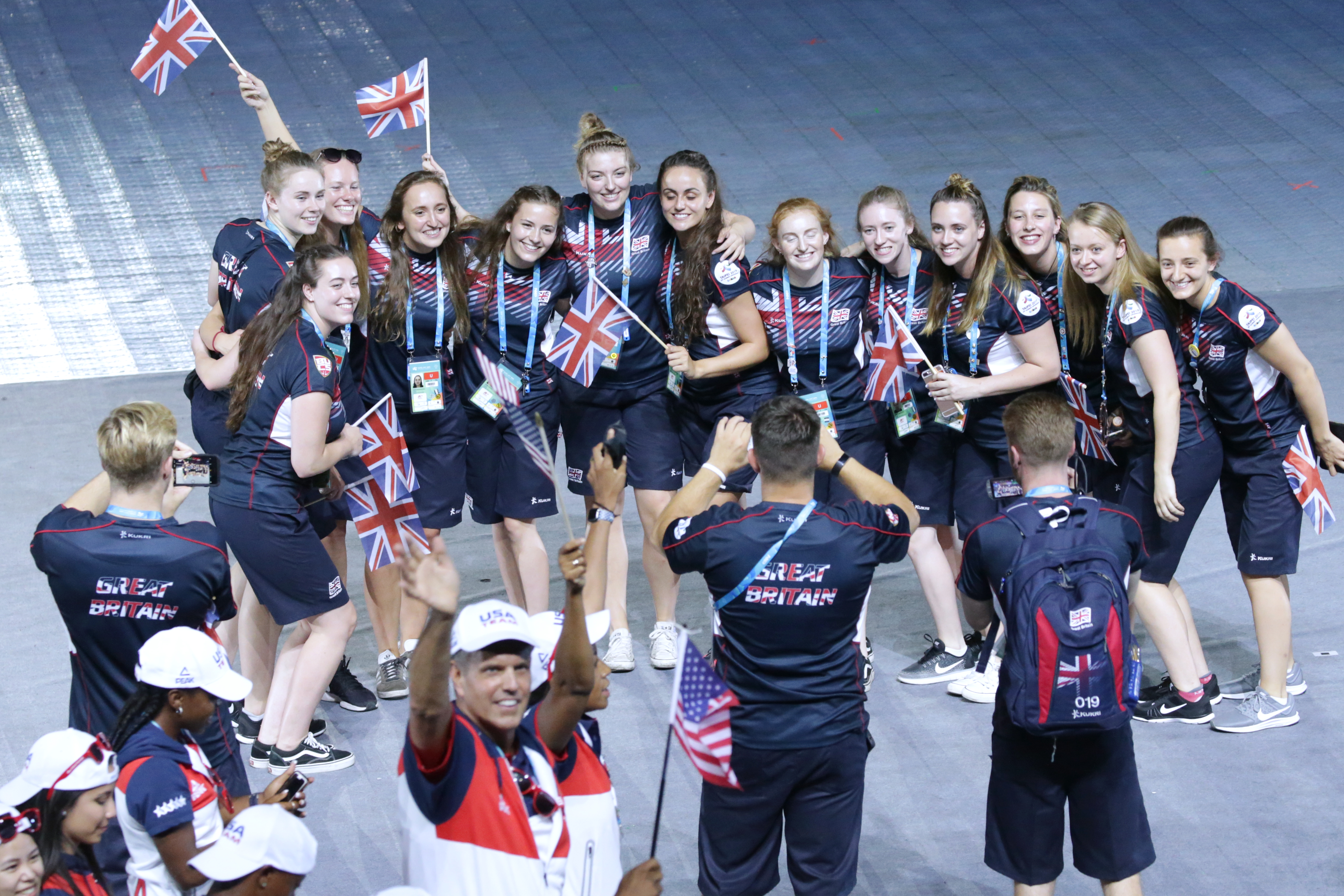 08.19 2017年世界大學運動會開幕典禮，各國選手代表與會旗進場